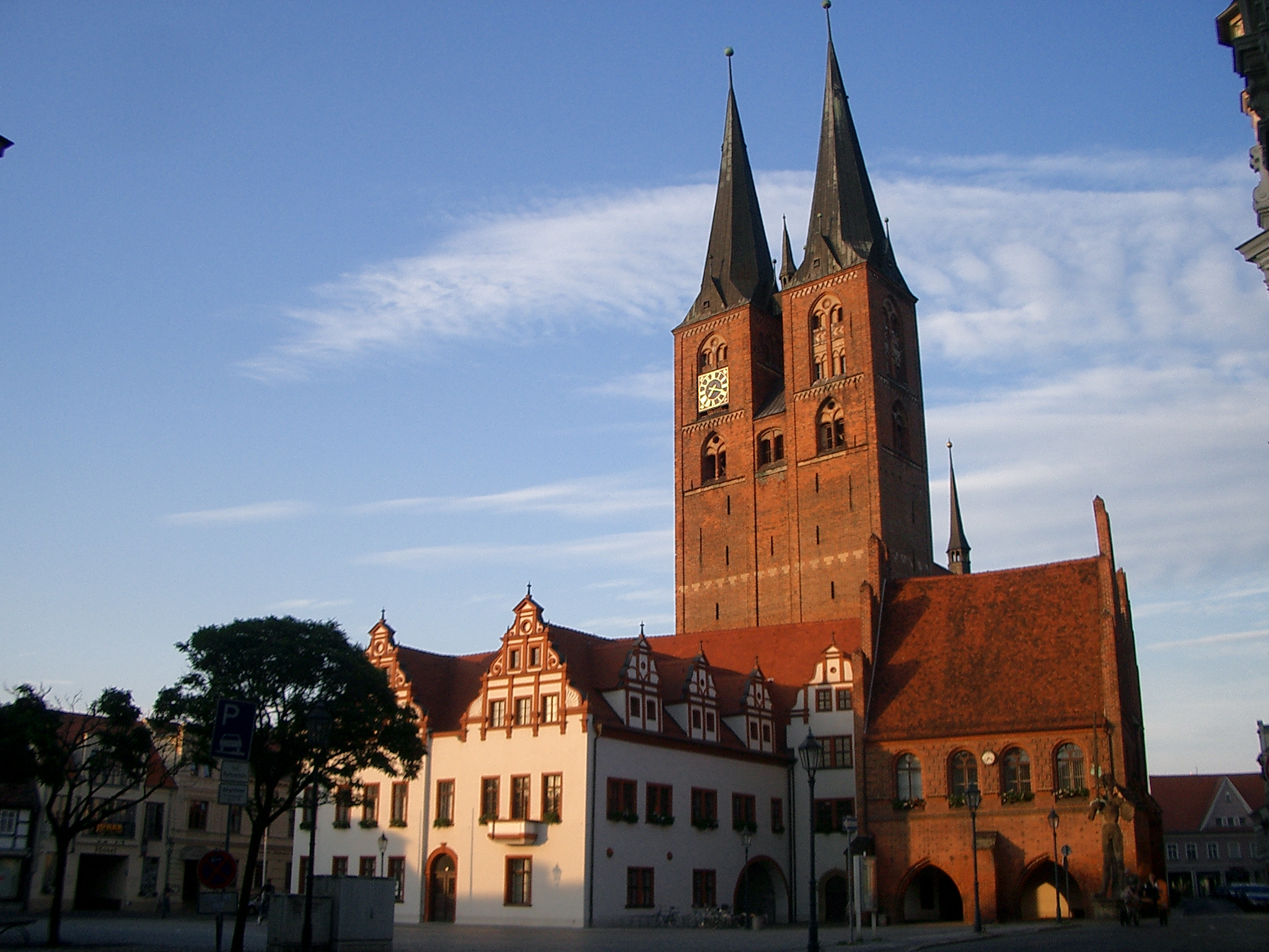 Markt in Stendal mit Marienkirche, Rathaus und Roland